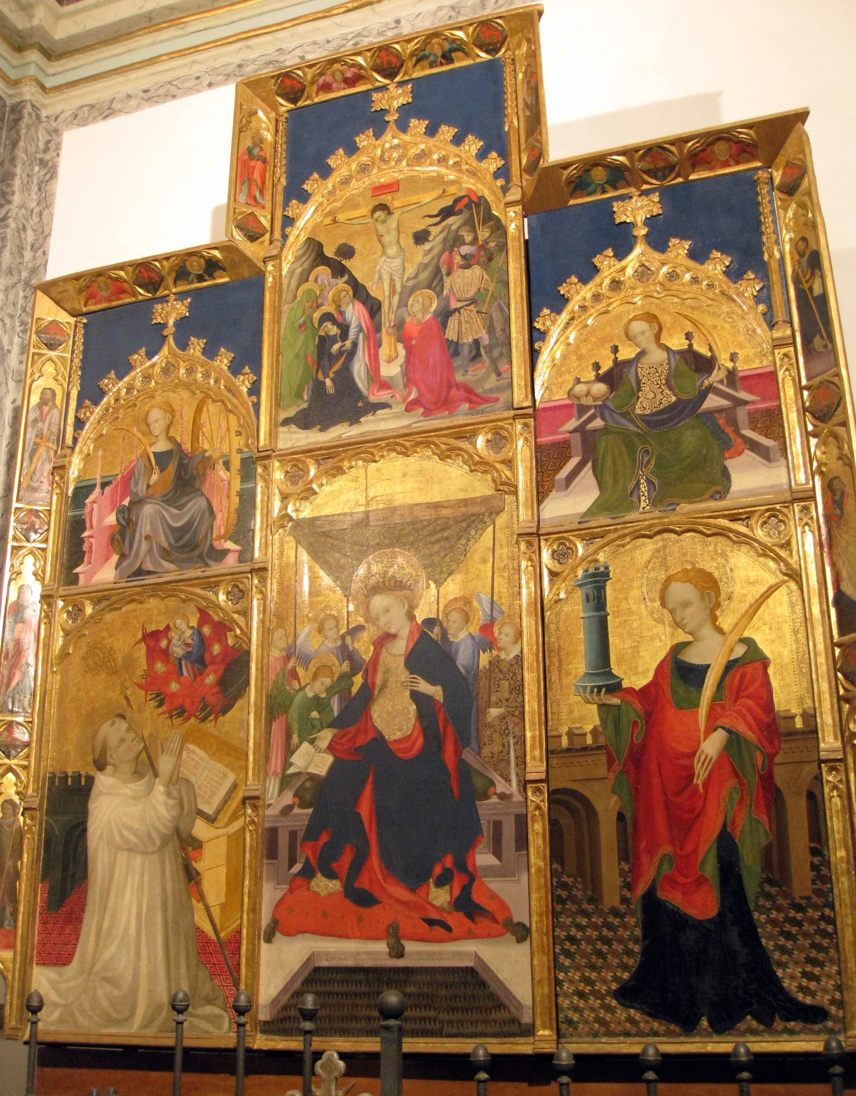 Església parroquial de l'Assumpció (Albocàsser) 02.003-009.